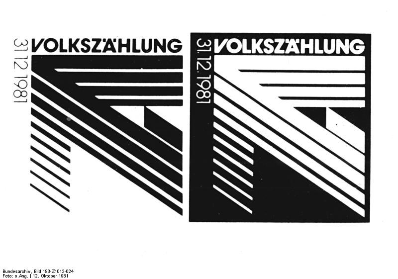 Logo der Volkszählung 1981 ADN-ZB Repro 12.10.1981-zi-Emblem zur Volks-, Berufs-, Wohnraum- und Gebäudezählung, die mit Stichtag vom 31.12.1981 in der DDR stattfindet.